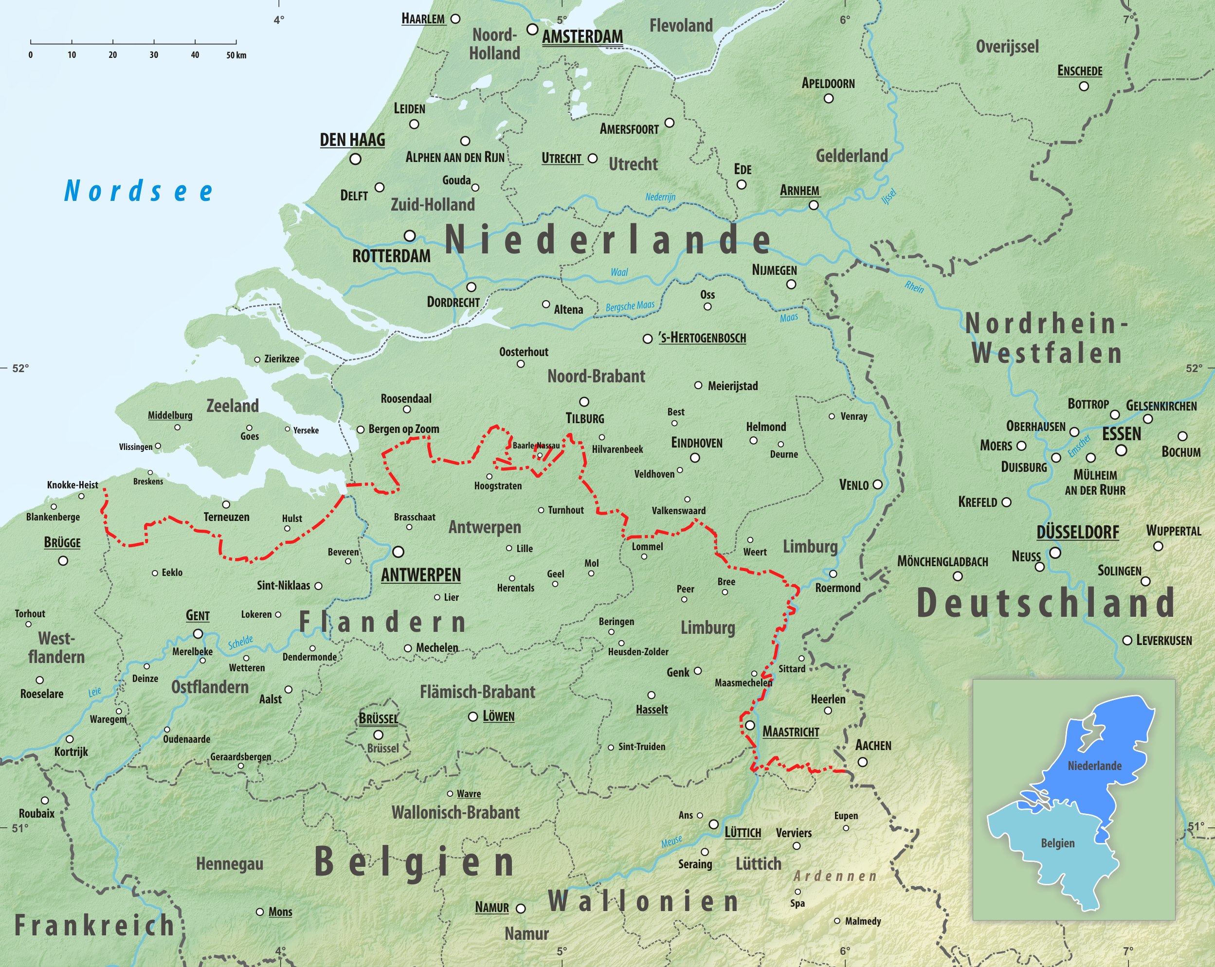 Reliefkarte des Grenzverlaufes zwischen Belgien und der Niederlande Topographischer Hintergrund: NASA Shuttle Radar Topography Mission (public domain). SRTM3 v.2.